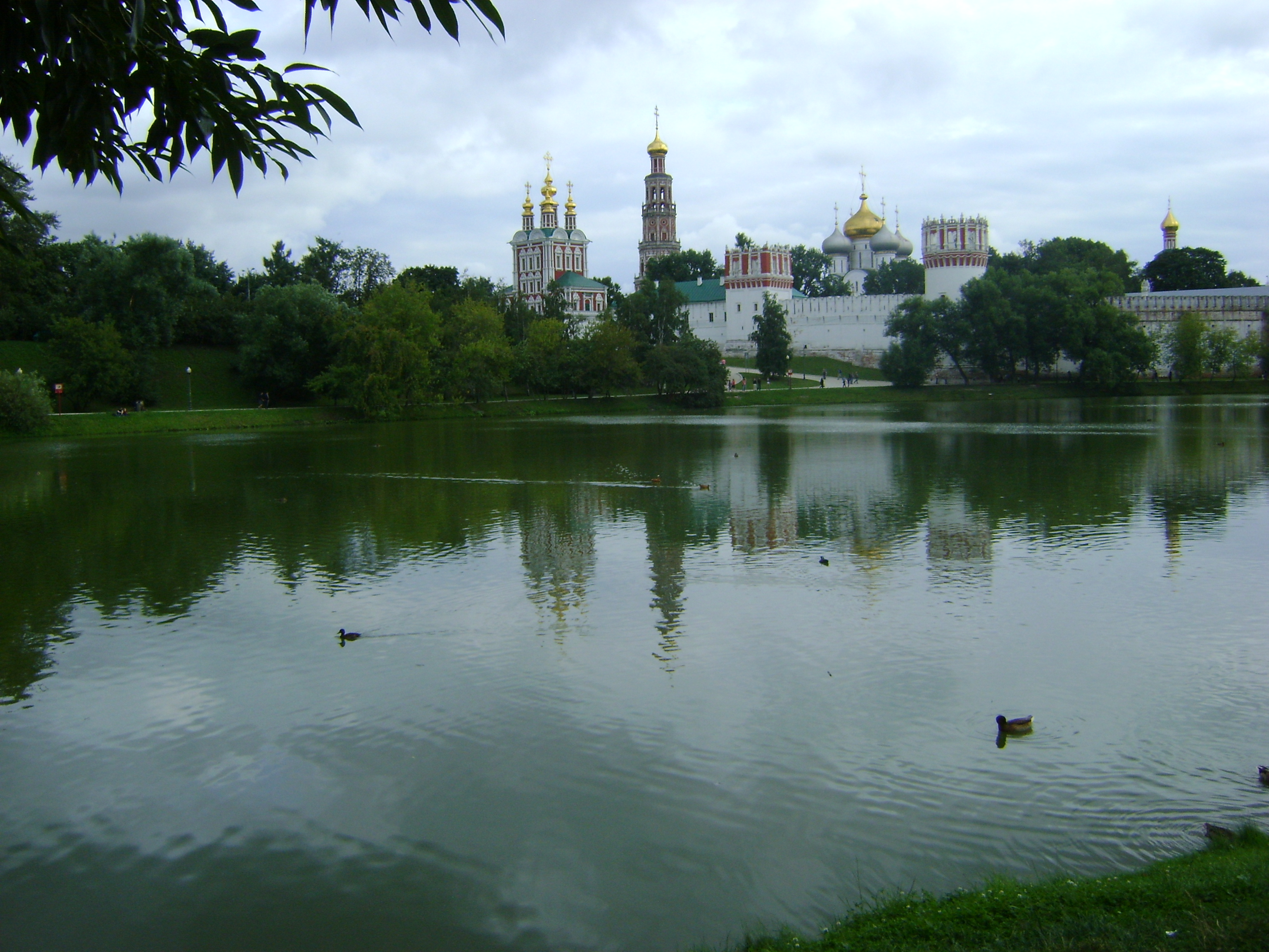 Вид з боку монастирського ставка.